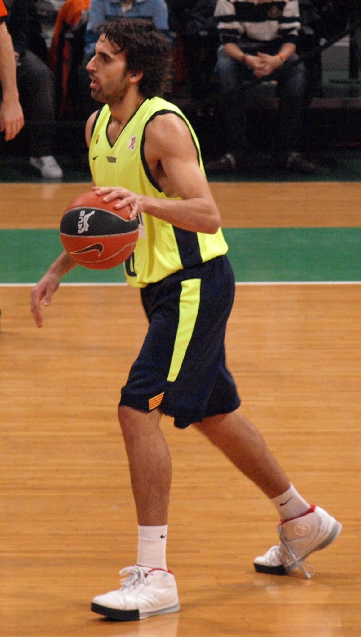 Victor Sada, en el partido que enfrentó al FC Barcelona y al DKV Joventut de liga ACB en el Olímpico de Badalona en enero de 2009